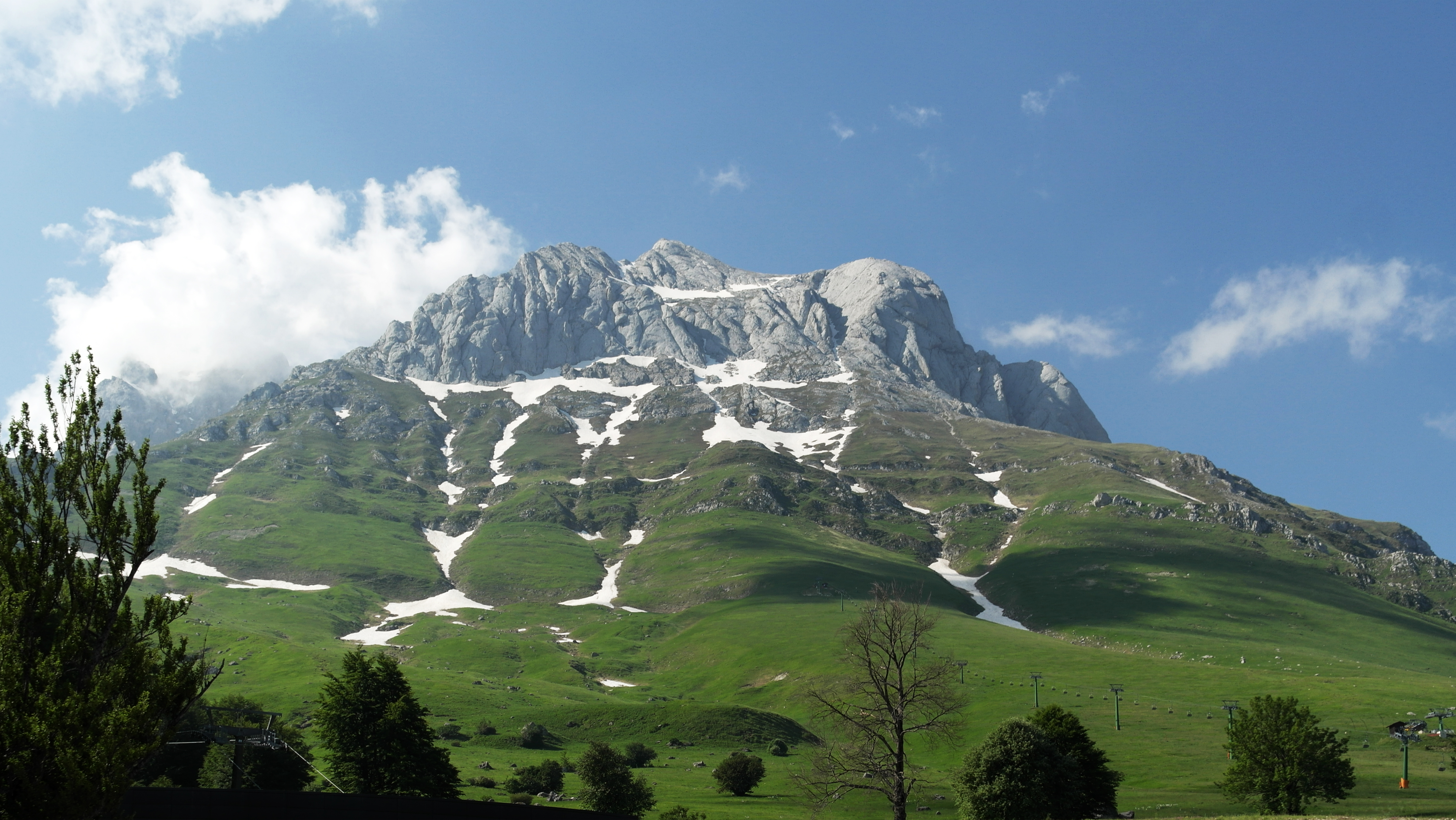 Corno Piccolo, Gran Sasso, Province of Teramo, Abruzzo, Italy